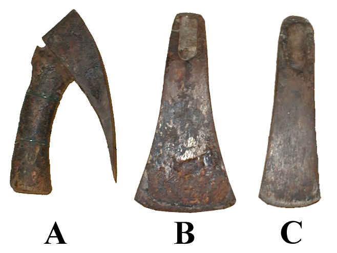 Das Bild zeigt drei Pecherdechseln: A seitlich, B Fürhackdechsel, C Plätzdechsel. Es handelt sich dabei um in Niederösterreich gebräuchliche Formen. Sie wurden in der Pecherei eingesetzt.